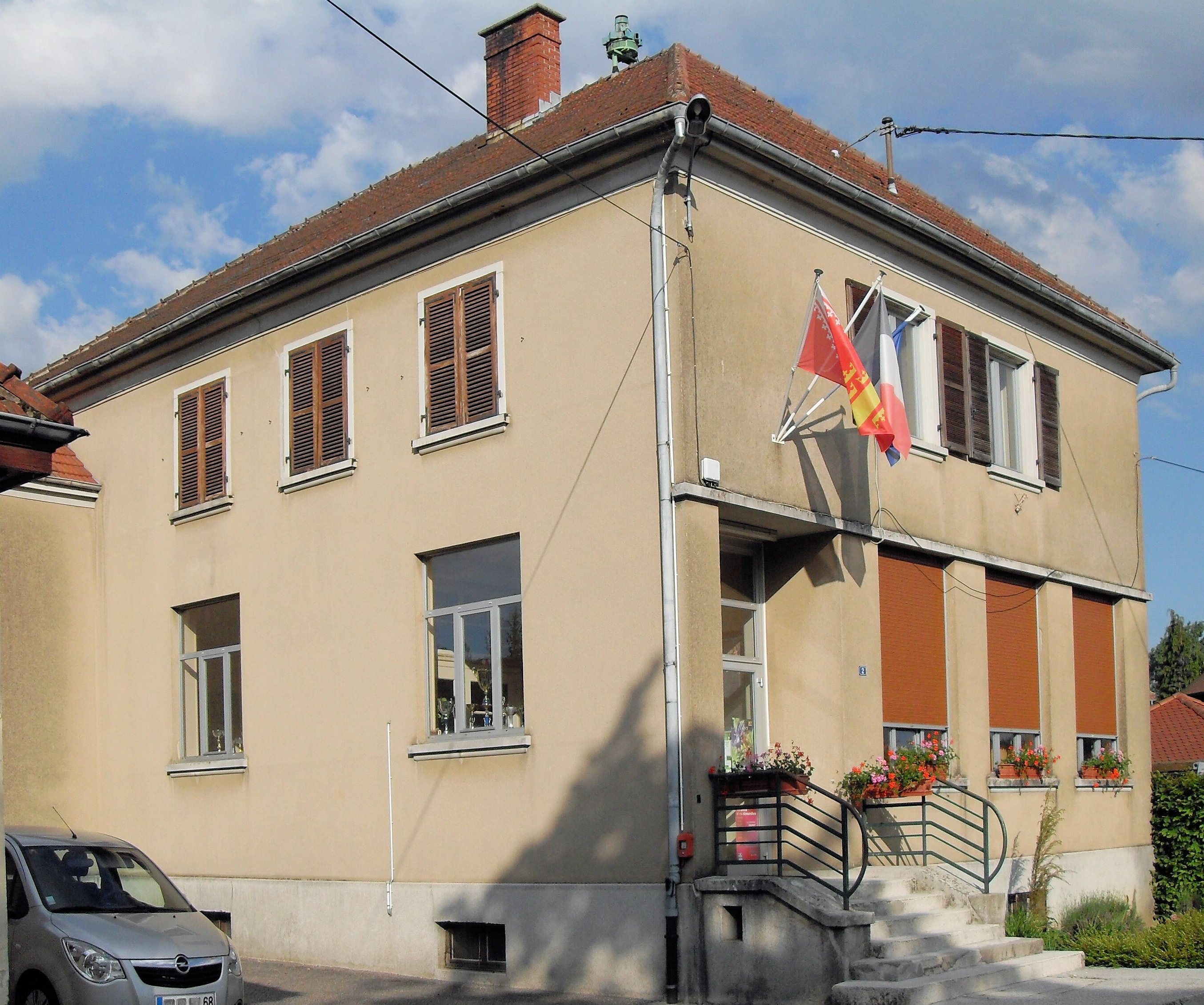 La mairie de Mooslargue